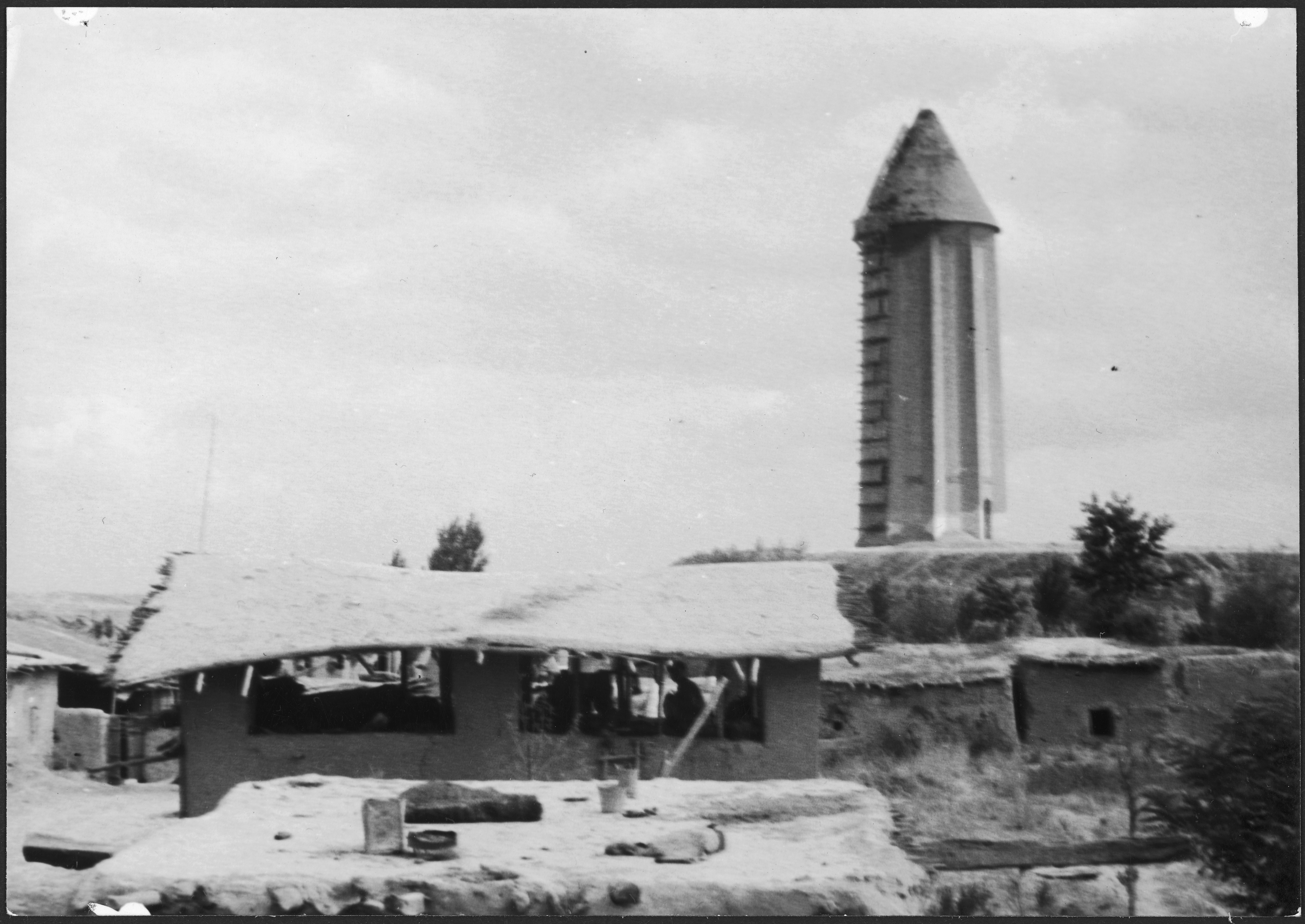 Iran, Gumbad-i-Gabus (Gonbad-e Qabus, Gonbad-e Kabood): Grabturm; Im Hintergrund der Grabturm, im Vordergrund Hütten